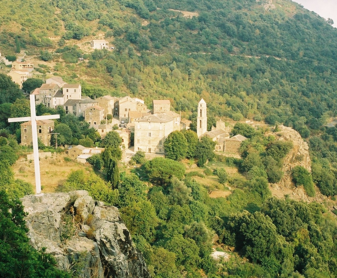 Tox (Haute-Corse) vu depuis la route de Moïta